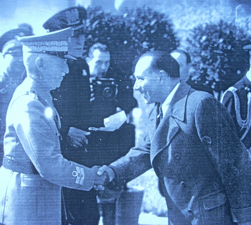 Gianni Caproni stringe la mano a Vittorio Emanuele III durante una cerimonia pubblica, 1940 ca (Archivio famiglia Caproni Roma)